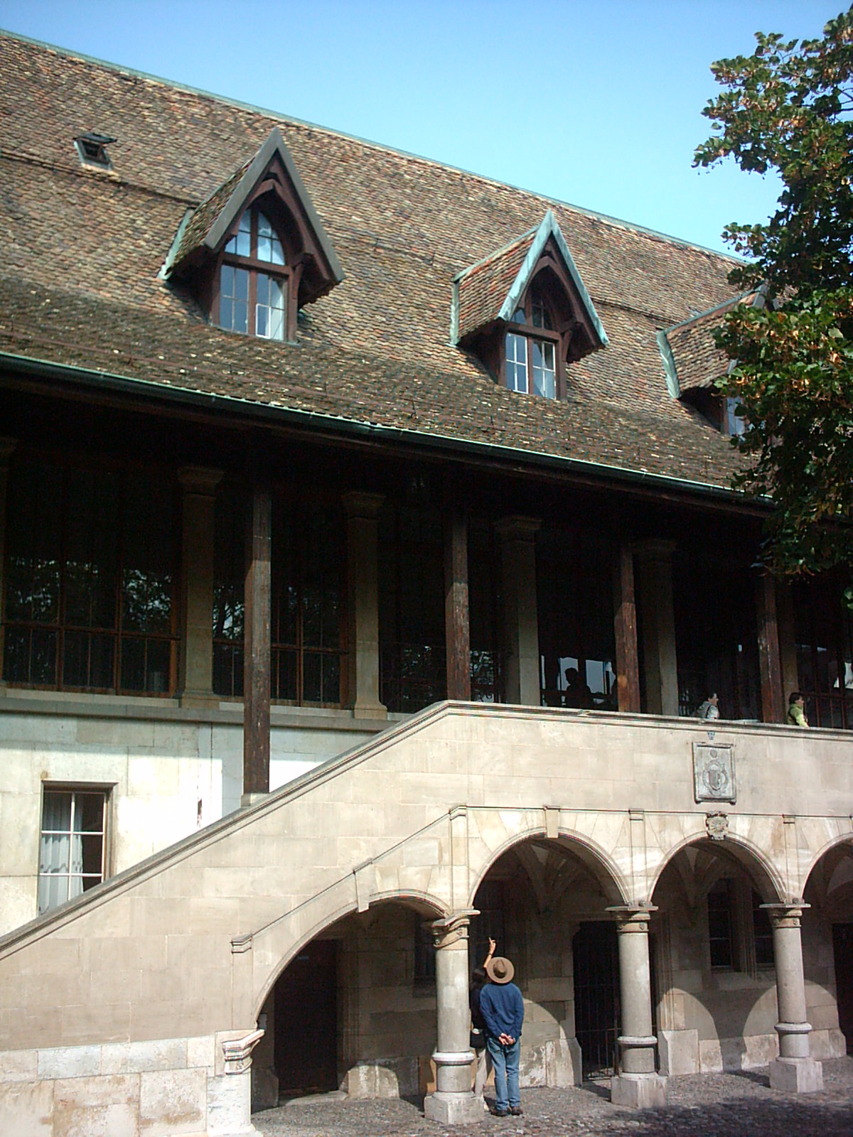 Aile ouest du collège Calvin de Genève (Suisse)